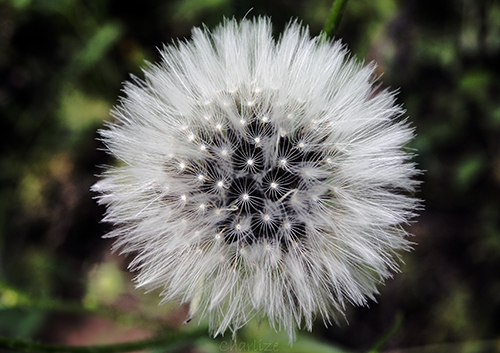 Cipselas diente de león